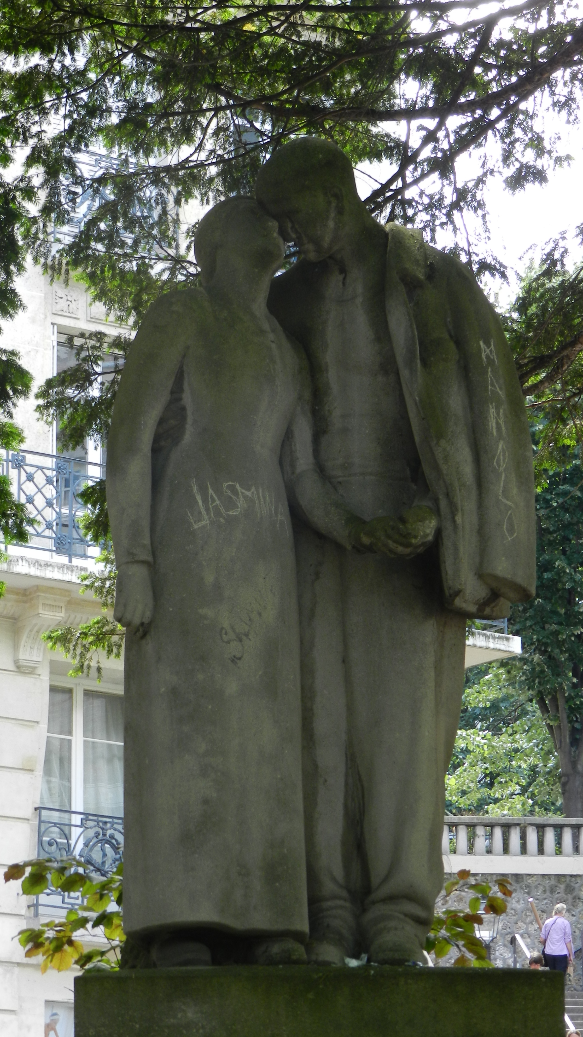 Détail du Monument à la mémoire de Théophile Alexandre Steinlen (1859-1923), dit aussi Fontaine Steinlen, installé en 1936, Square Joël-Le-Tac (square inauguré en février 2012, précédemment square de la place Constantin-Pecqueur), XVIIIe arrondissement, Paris, France.